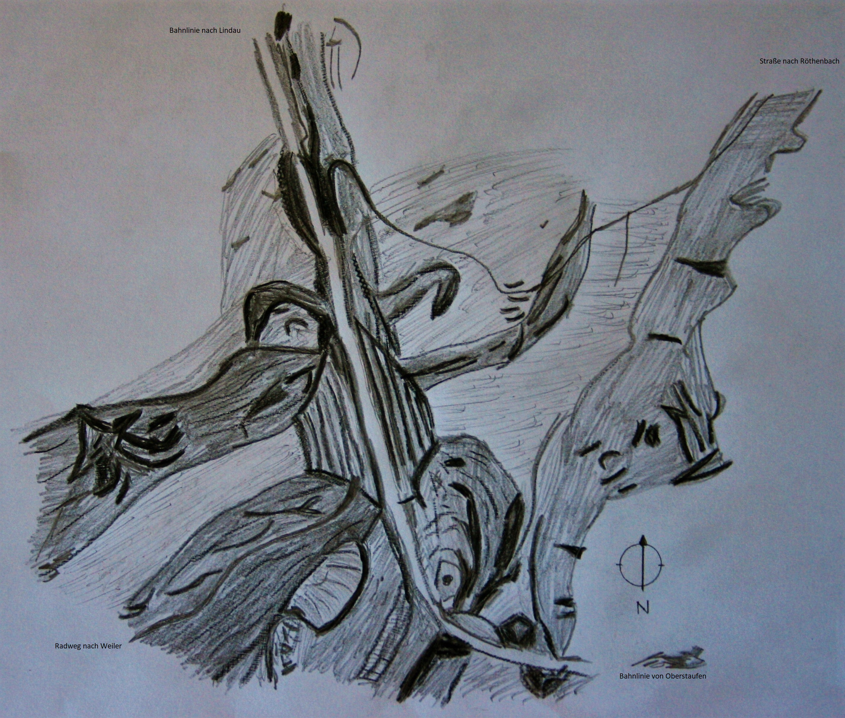 Rentershofener Bahndamm